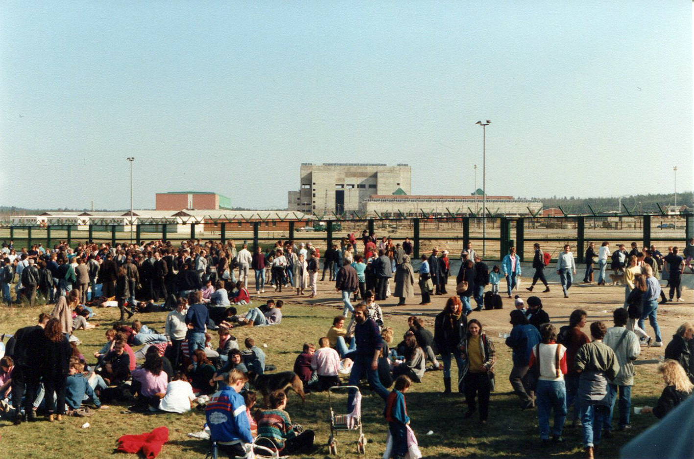 Demonstration am Bauzaun zur geplanten Wiederaufarbeitungsanlage Wackersdorf (WAA), Mrz 1989